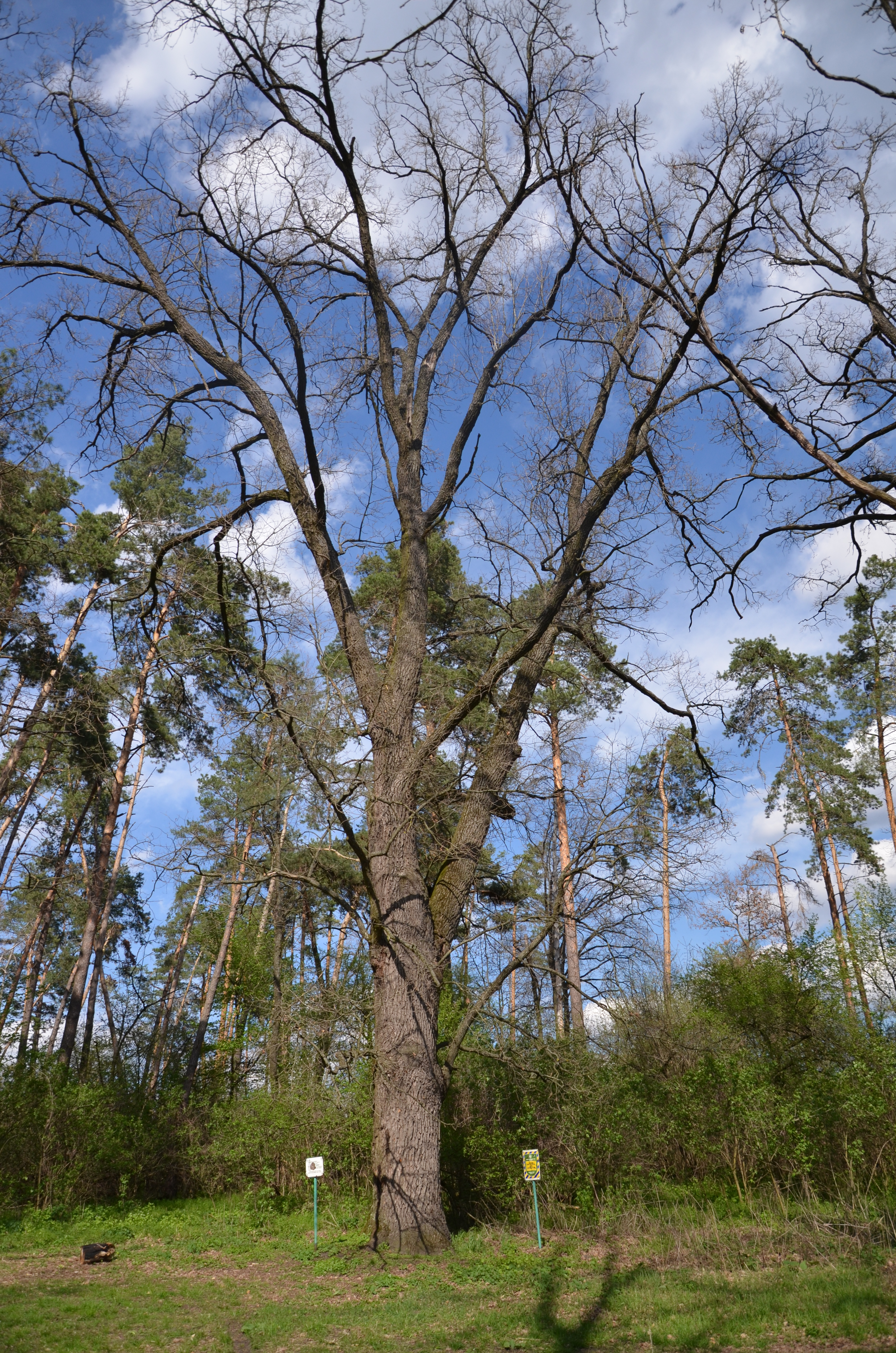 «Дуб черешчатий», Фастівський район, Волицька сільська рада